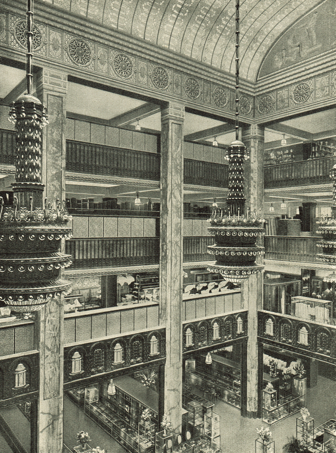 mittlerer Lichthof im Warenhaus Althoff Leipzig, 1914